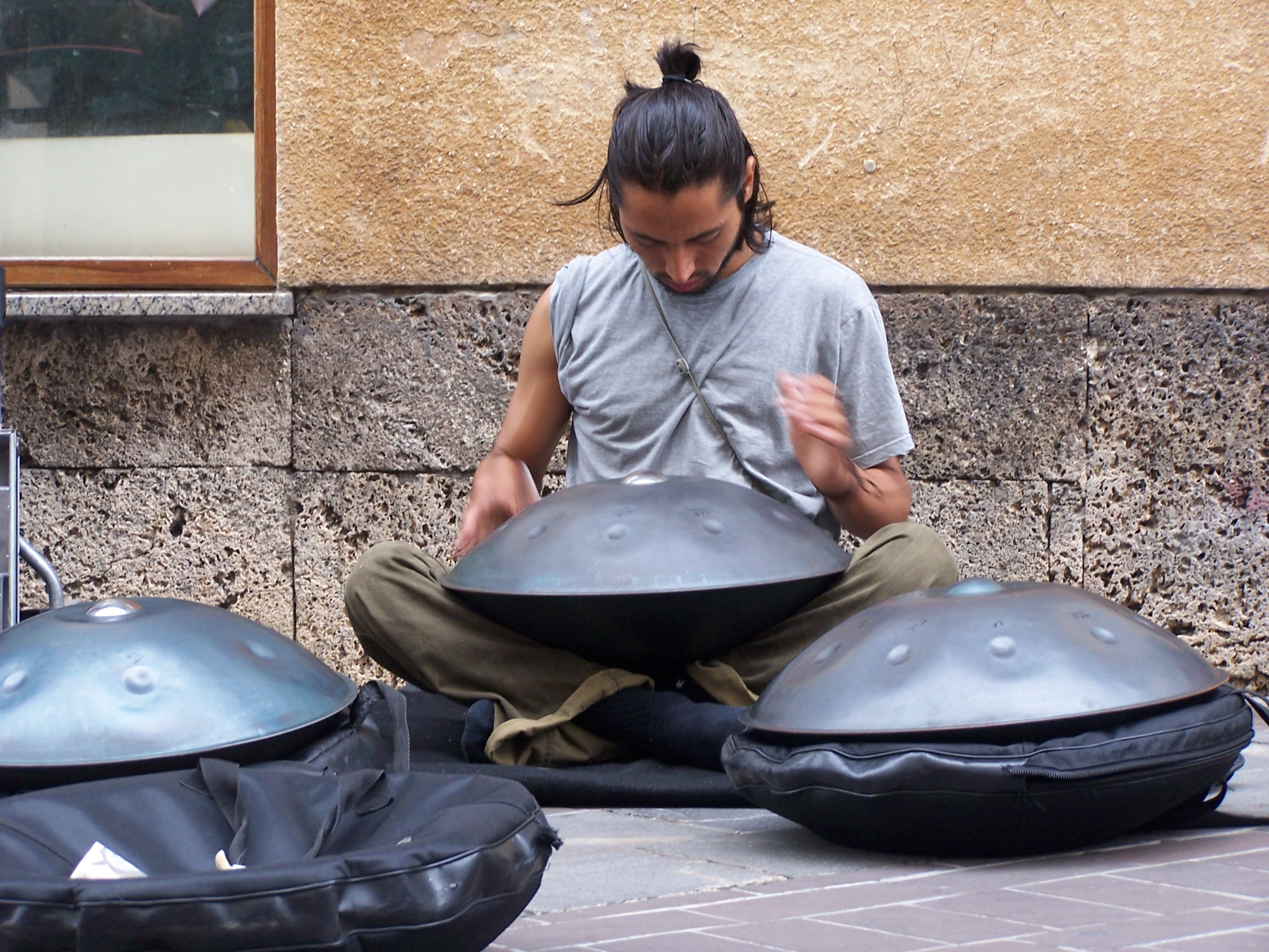 Zelf gemaakte foto van een Hang speler, getrokken in de straten van Ljubljana, Slovenië.